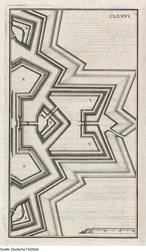 Original image description from the Deutsche Fotothek Architektur & Geometrie & Festungsbau & Hornwerk